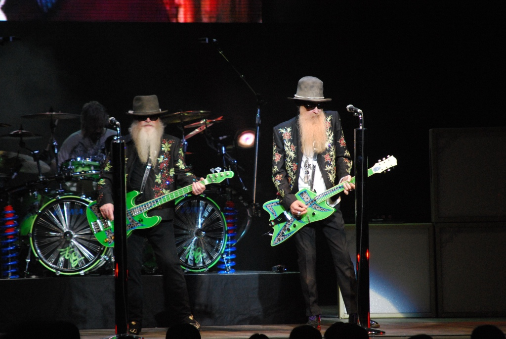 ZZ Top - Via Funchal - S.Paulo